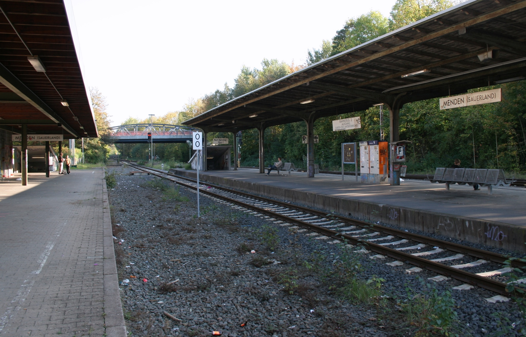 Bahnsteig Bahnhof Menden (Sauerland) der Hönnetalbahn in Menden.